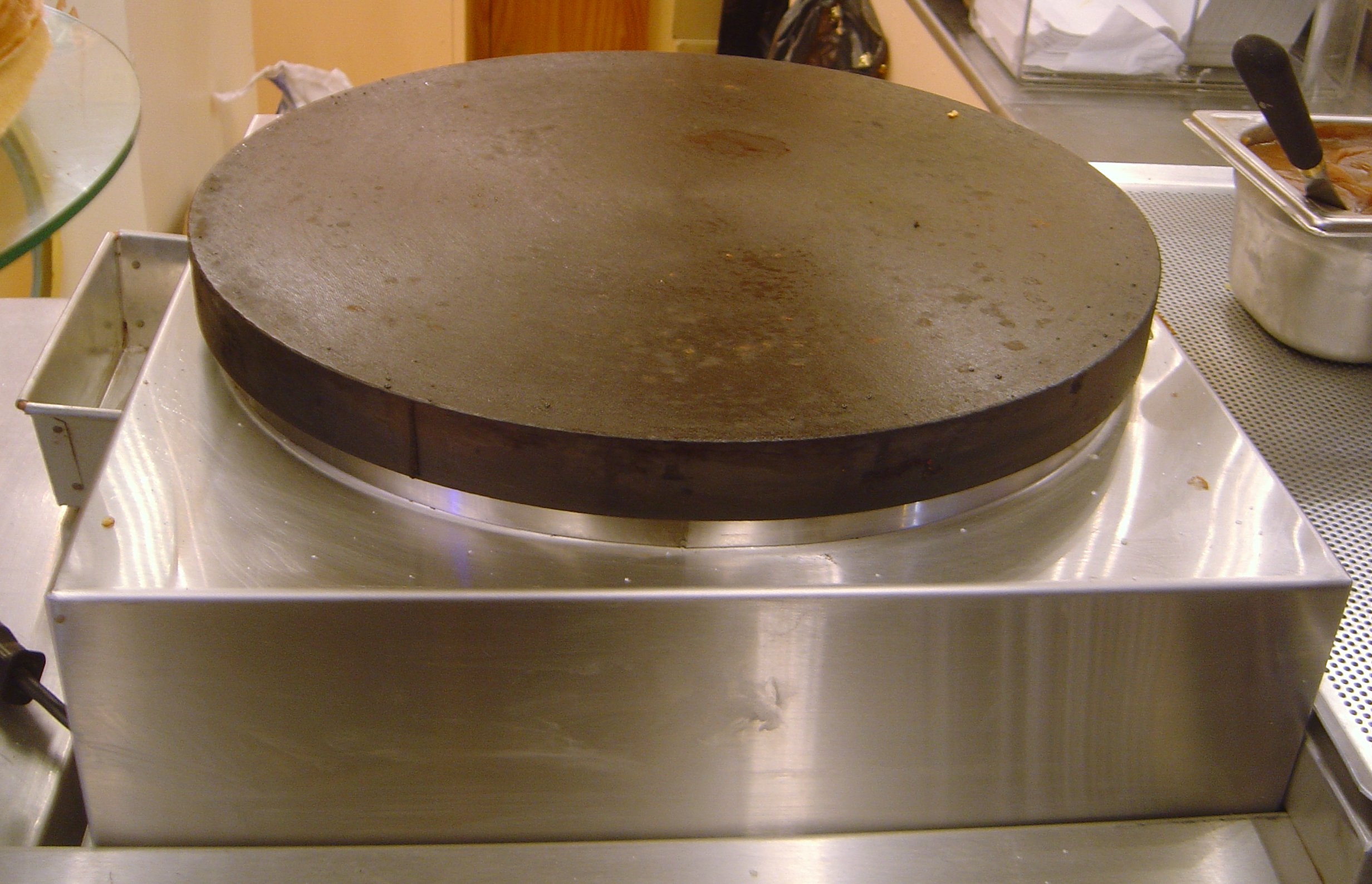 Crêpes pan (bilig)